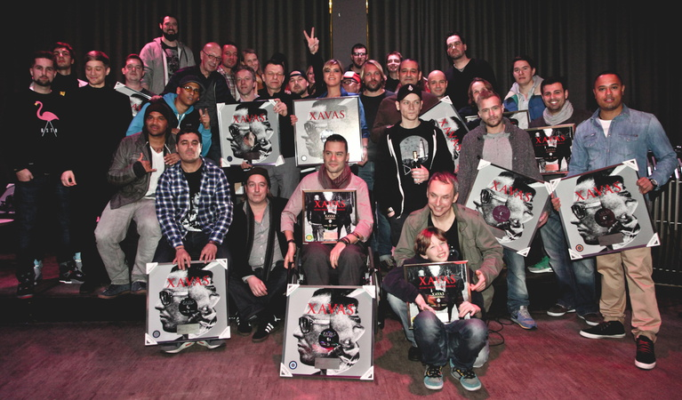 Gold- und Platin-Verleihung des Albums „Gespaltene Persönlichkeit“ (7inch, Maeckes und Sir Jai, Smoli + Perry (Beathoavenz), Olli Banjo, Xavier Naidoo, Kurt Erping (Geschäftsführer tonpool Medien), David Laube (Essah Entertainment), Konrad von Löhneysen (Geschäftsführer Embassy of Music), Peer Kurrer (Marketing-Söldner), Stefanie Johst (Naidoo Records), Jörn Zimmermann, Jens Fischer (beide Kanzlei Zimmermann + Decker), Kool Savas, Stefanie Rohn, Markus Engelhard, Malte Behrends (alle MyVideo), Melbeatz, Niels von Geyer (Guerilla Promotion), Milan Martelli (Produzent), Onur Dinc (Artwork), Dennis Saia (Starkult Promotion), Ramin Bozorgzadeh (Groove Attack), Patrick Strauch (Managing Director Sony/ATV Publishing), Eric Ullrich (Artwork), Katja Kuhl (Fotografin), DJ Smoove (Produzent), Kolja Brandt (Videoregisseur), Rocco Kopecny (Bears calling Videoproduktion), Matthew Tasa (Mitproduzent), Sinch (Produzent), Bettina Wohlgefahrt, Susanne Paffrath (beide Public Image), Merle Lotz (PR & Medienservice) und Merlin Heckelmann (Essah Entertainment Online))